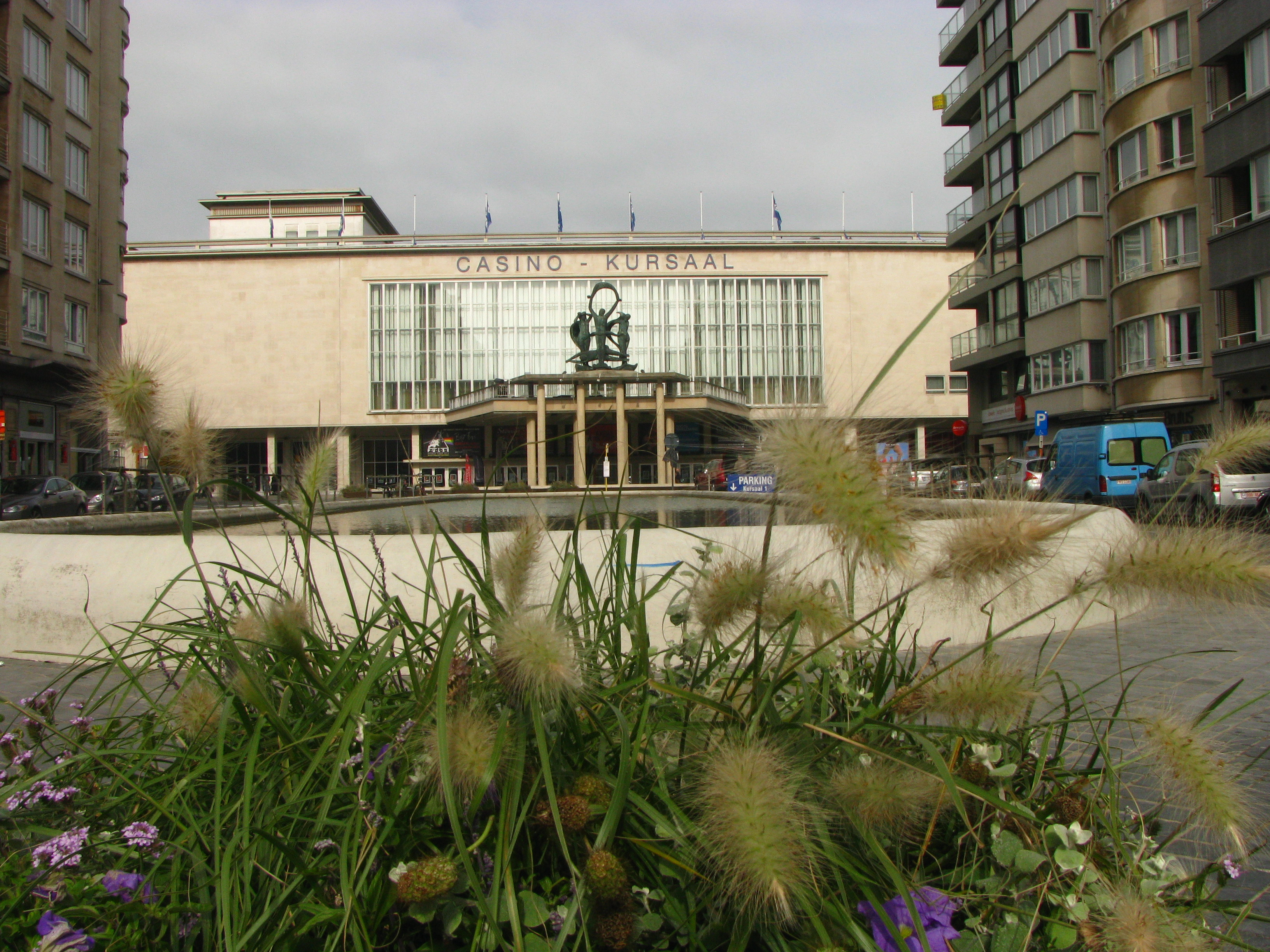 8400 Ostend, Belgium